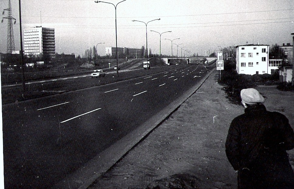 Poznań, ul. Witosa, 18.11.1989r.